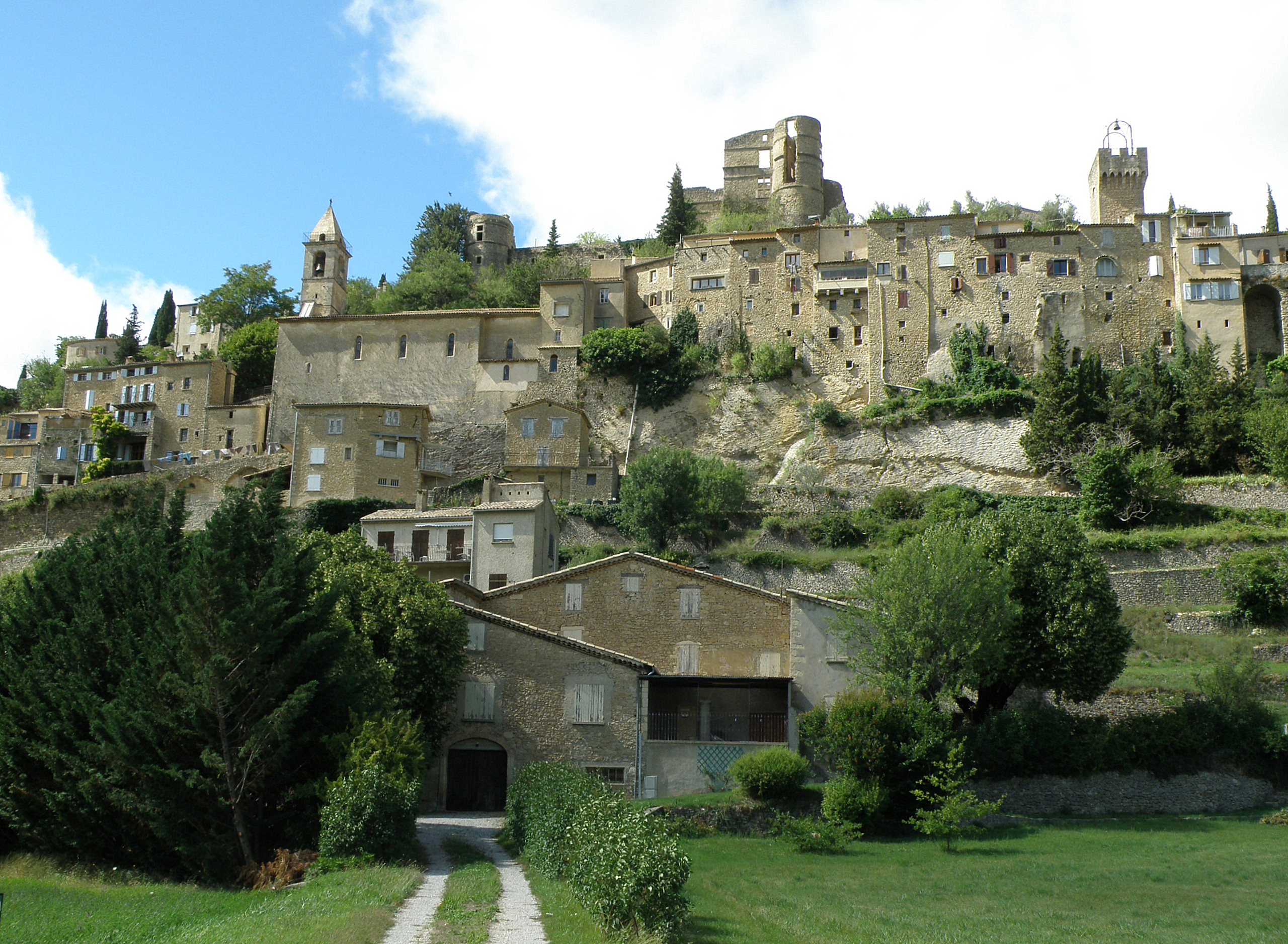 Montbrun-les-Bains (Drôme, France). Vue générale prise depuis la departementale D542 passant en contrebas du vieux village.